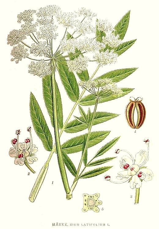 Original Description Märke, Sium latifolium L.